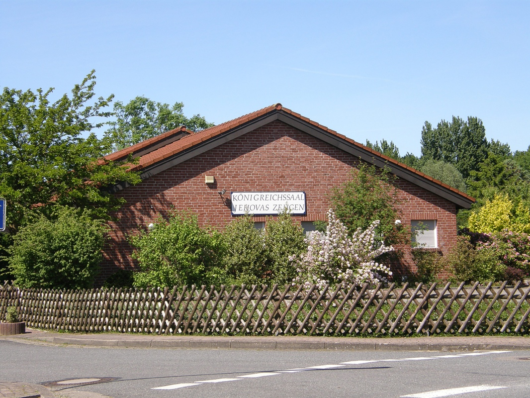 Text